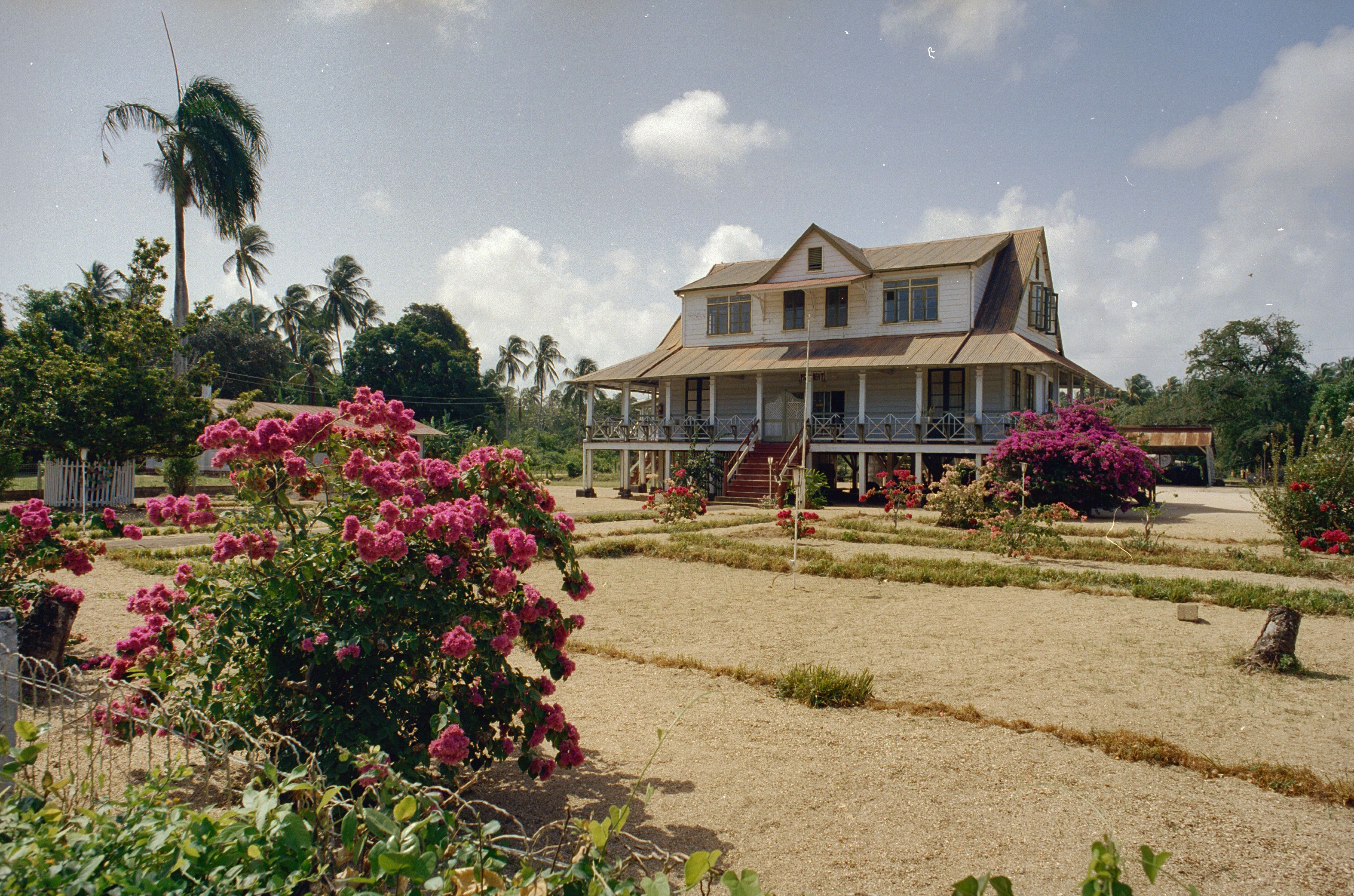 Koloniale geschiedenis/ Tuin: Vooraanzicht gevel en tuin (opmerking: Suriname Reis Loek Tangel)